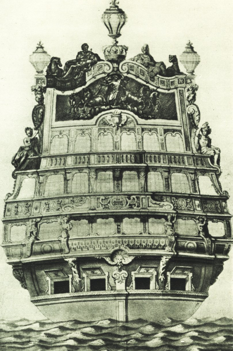 Poupe du Soleil Royal (1670), par Jean Bérain (Saint-Mihiel, 1639 - Paris, 1711).